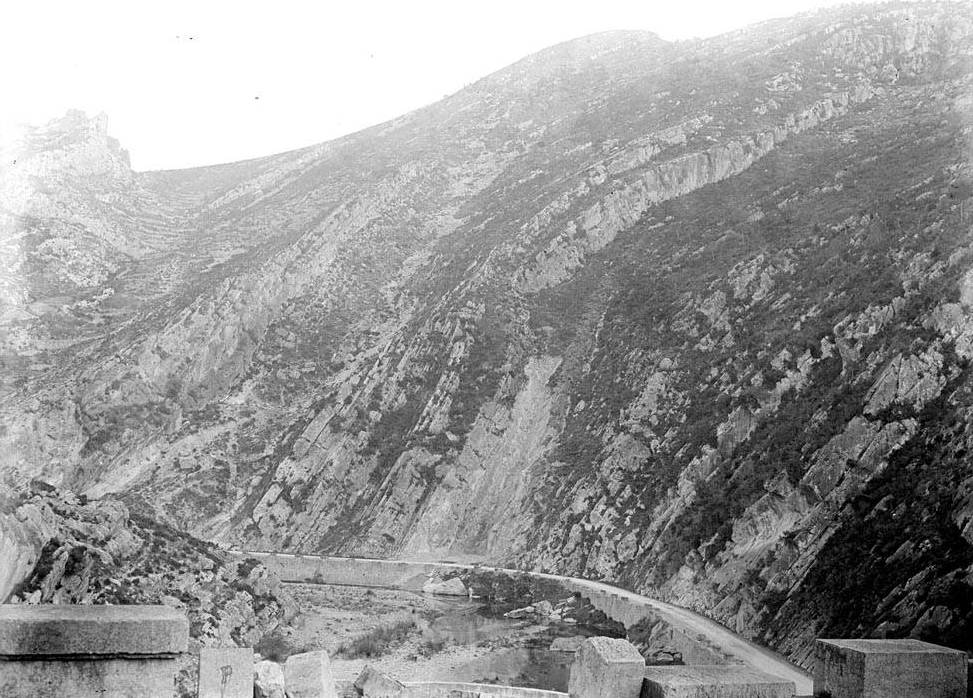 Anticlinal del Puigcabrer. Enric Ribas i Virgili (Entre 1920 i 1930)